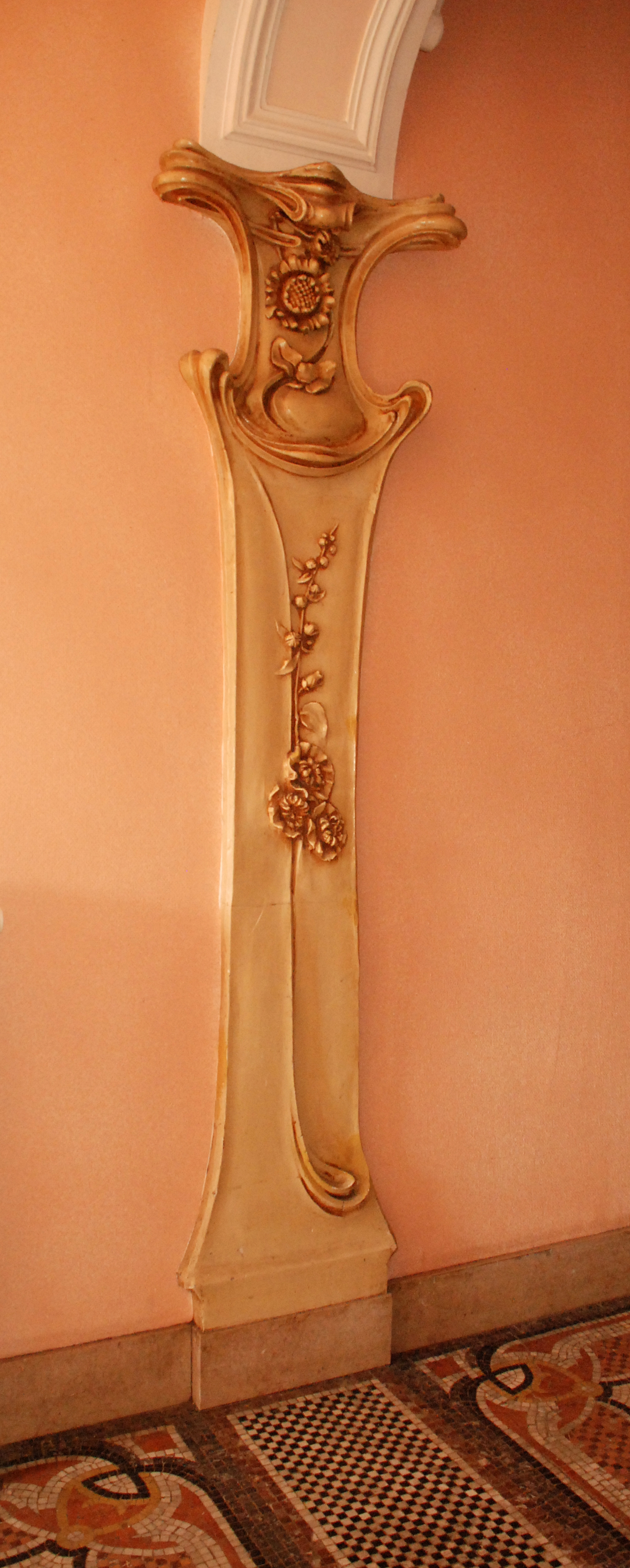 Belgique - Andenne - Achille Simon - Art nouveau